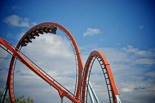 Port Adventura, Salou, Spain